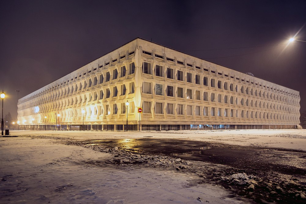 Главный корпус УлГПУ имени И.Н. Ульянова